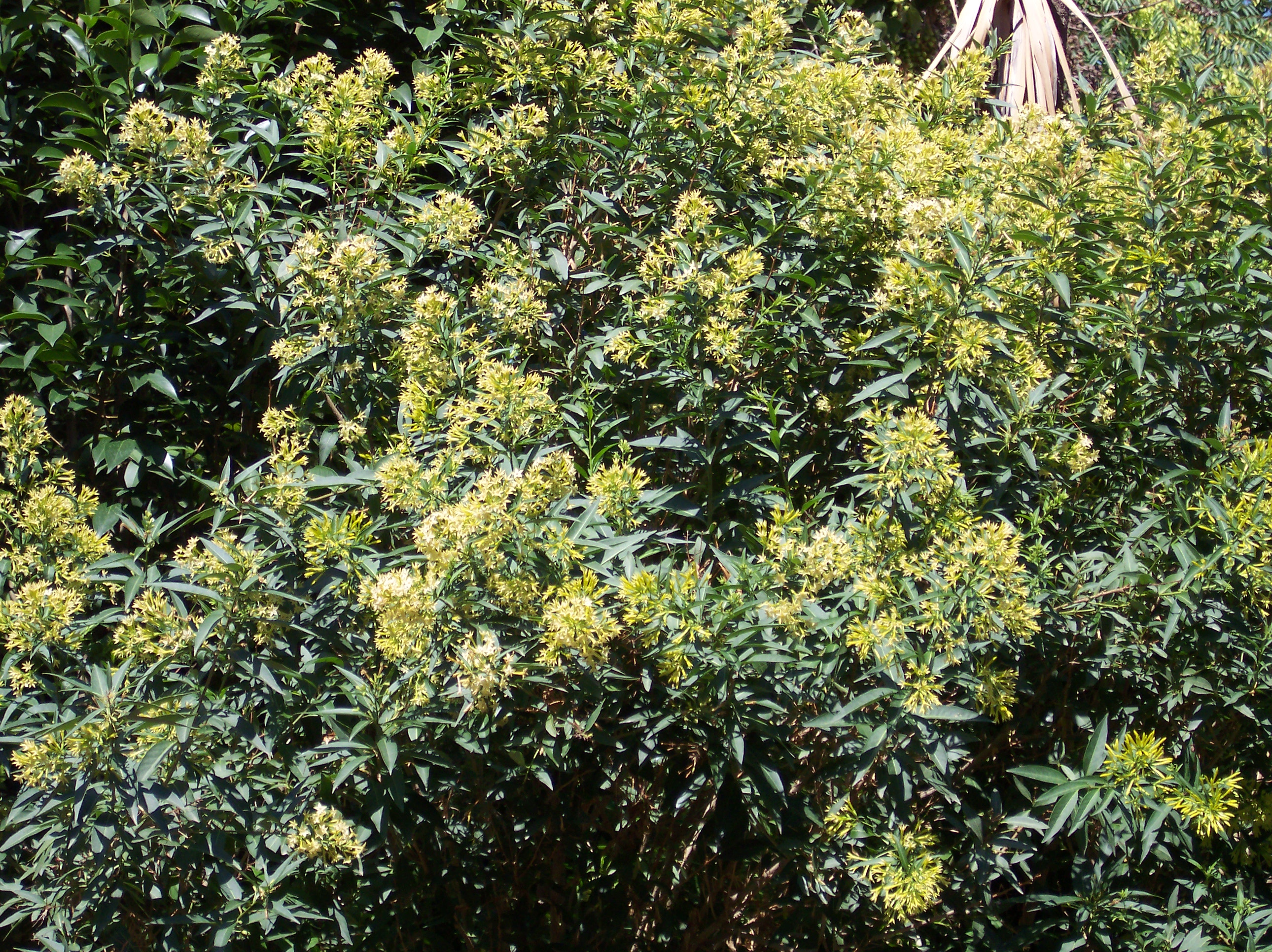 Cestrum parqui. Real Jardín Botánico de Madrid.